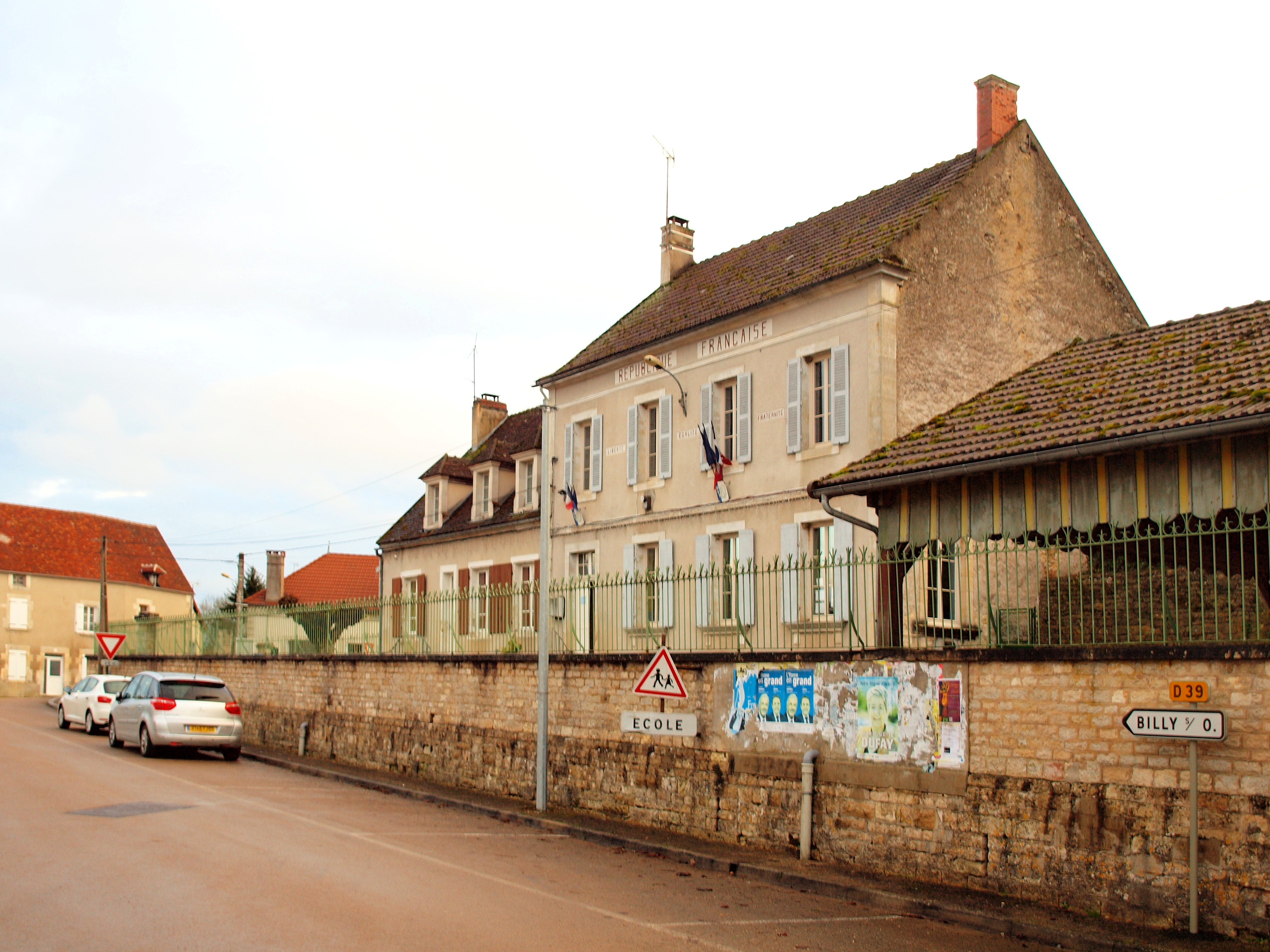 Andryes (Yonne, France) , la mairie-école